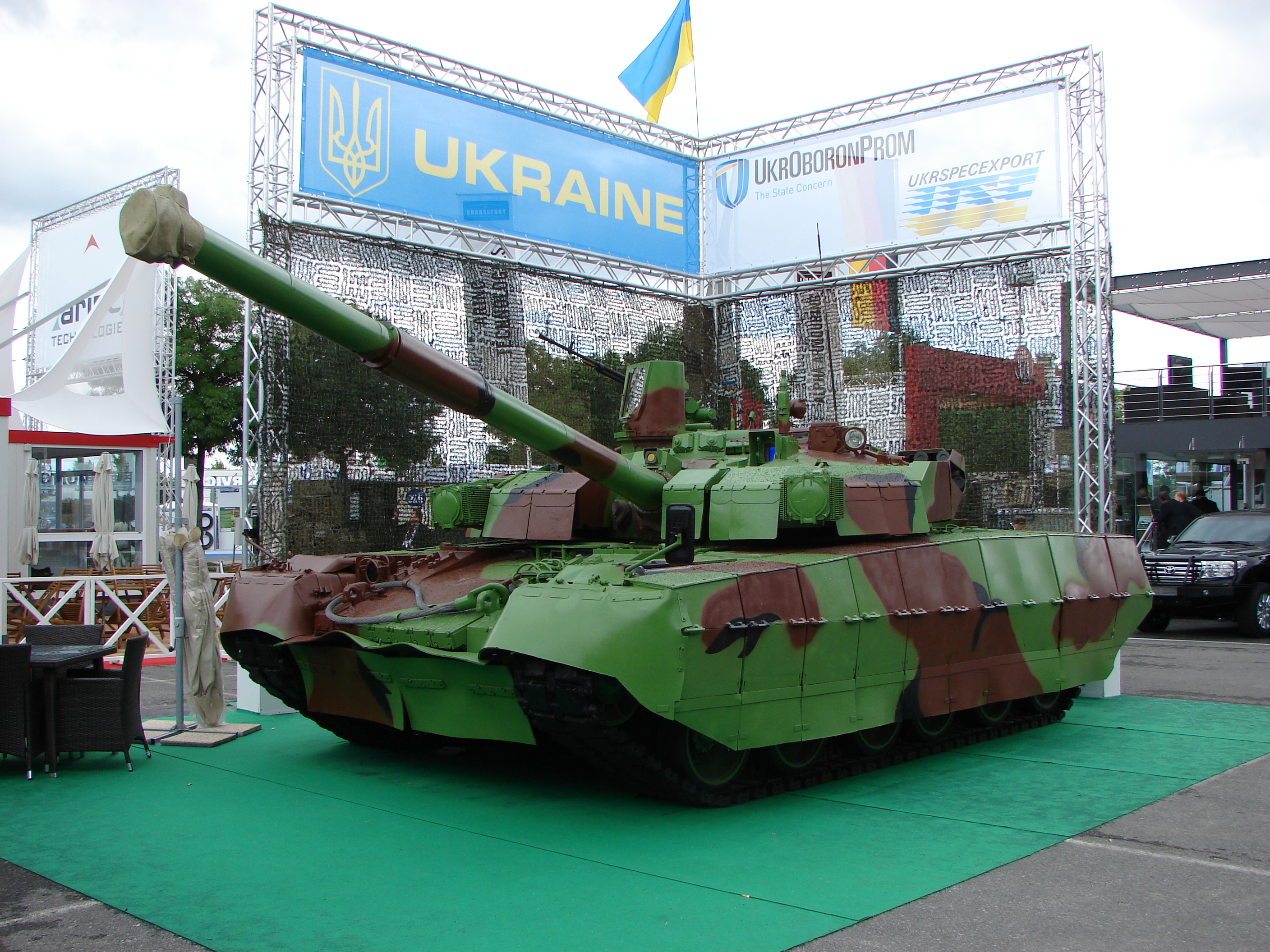 Tank ukrainien BM Oplot à Eurosatory 2012